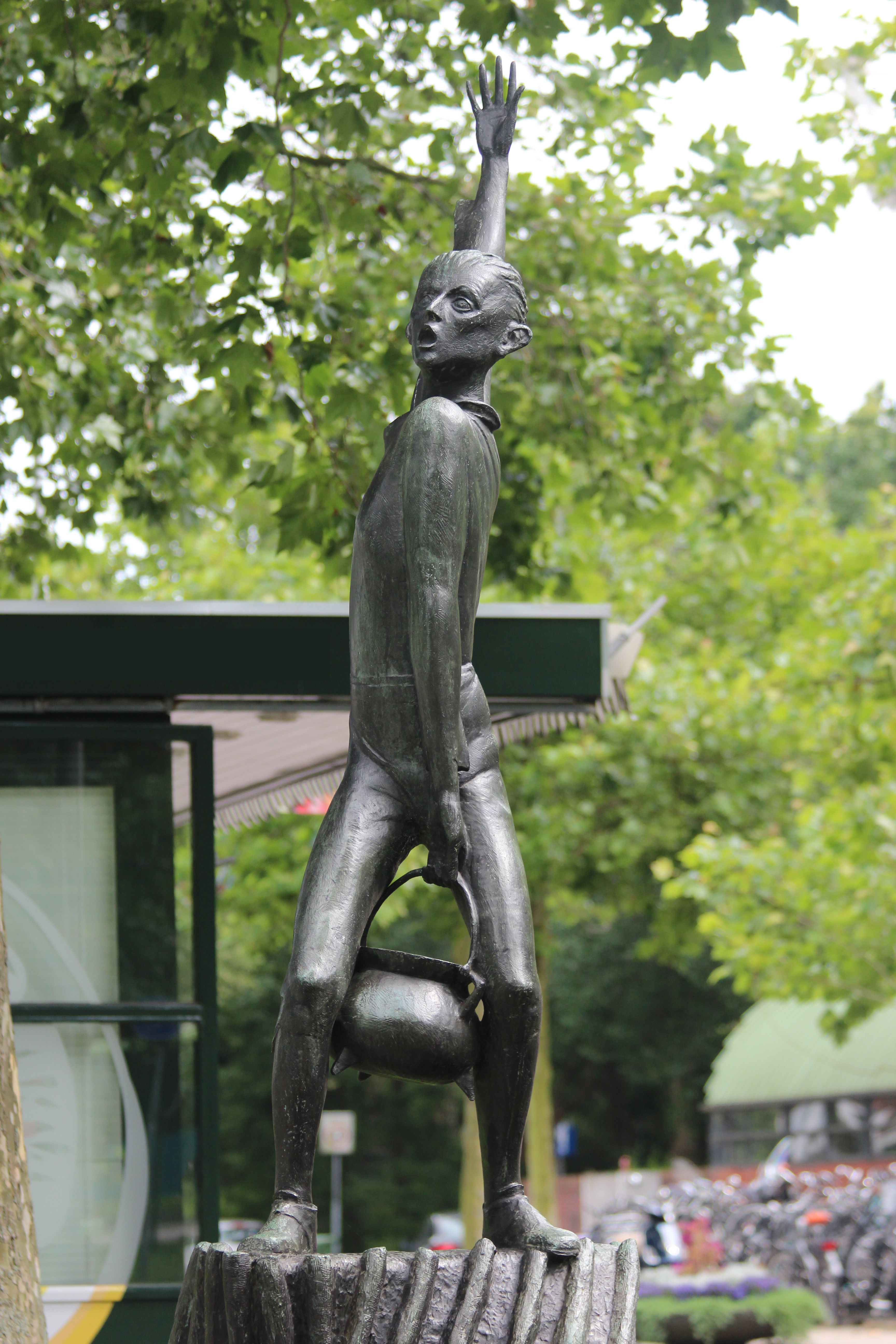 Oswald L. Wenckebach - Leidens ontzet - 1961 bij station Lammenschans te Leiden